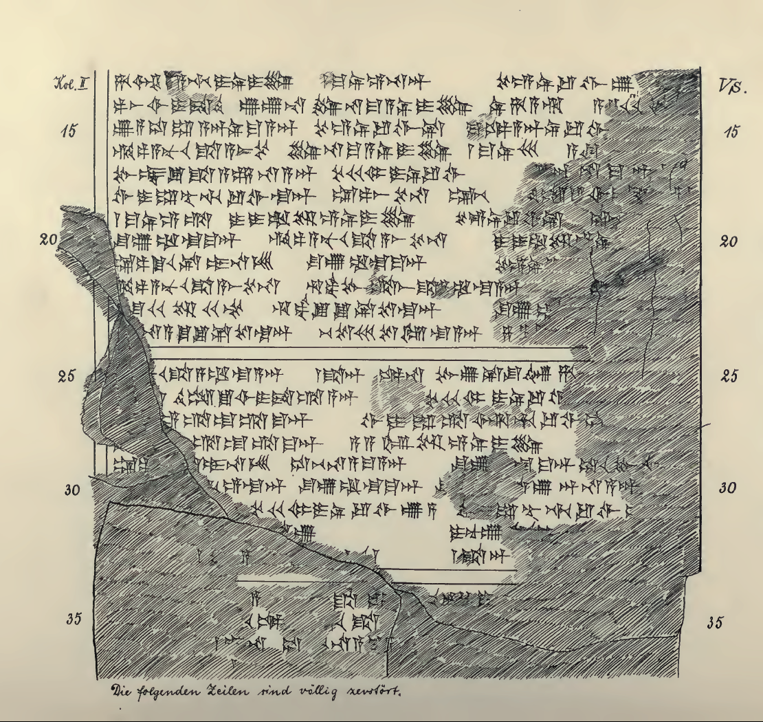 List Tuszratty do Amenhotepa III w języku huryckim – autografia.